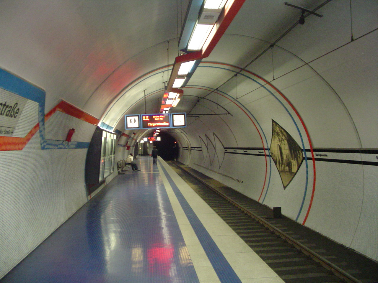 Essen Stadtbahn